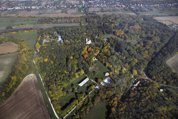 Alcsúti Arborétum 3.